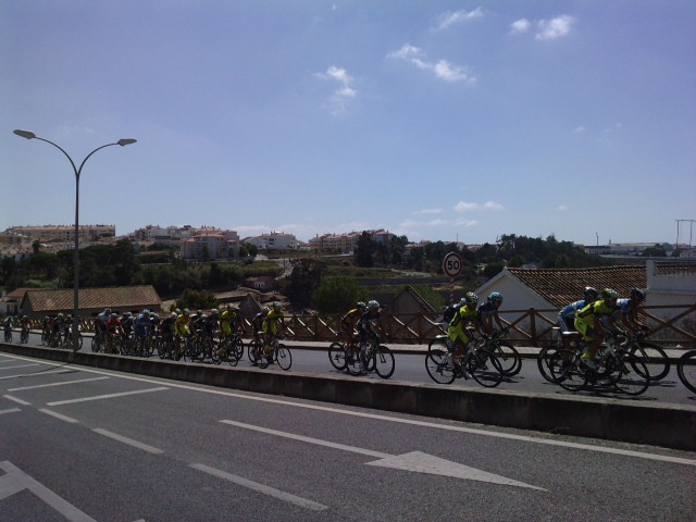 Pelotão da Volta a Portugal de 2012 a passar no Lugar da Paz, 26/08/2012